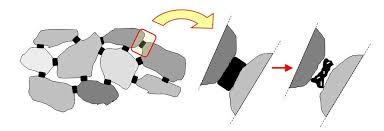 نحوه توزیع قیر آغشته به فیلرها و بین ذرات بعد حرارت دیدن